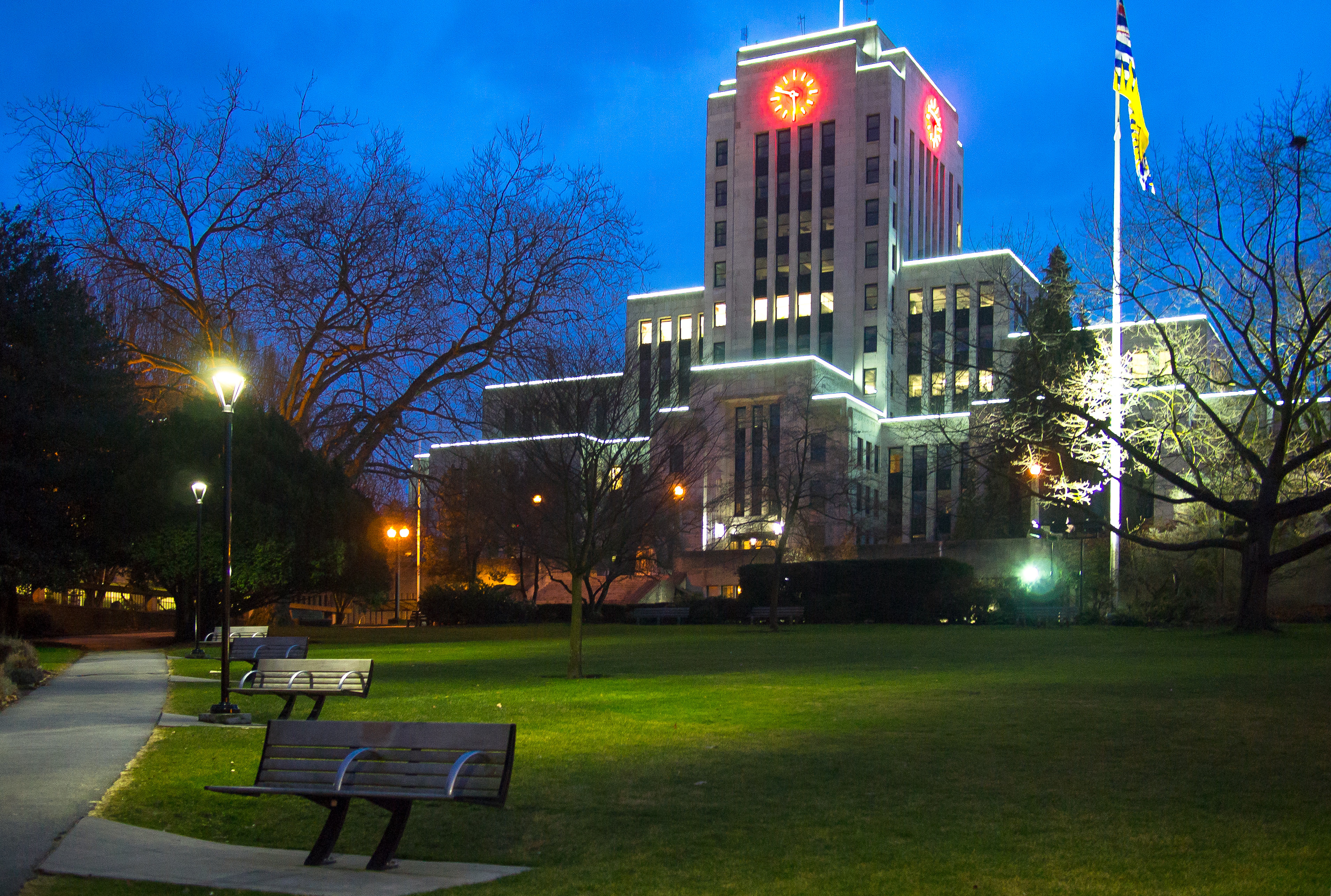 Vancouver